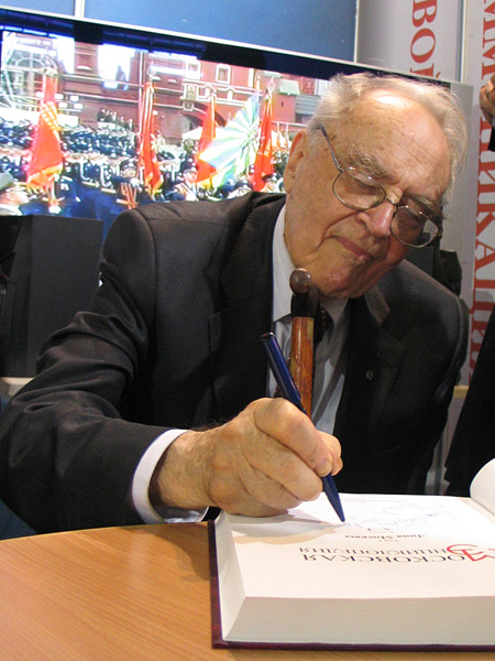 Сигурд Оттович Шмидт даёт автограф на Московской Международной Книжной Выставке-Ярмарке